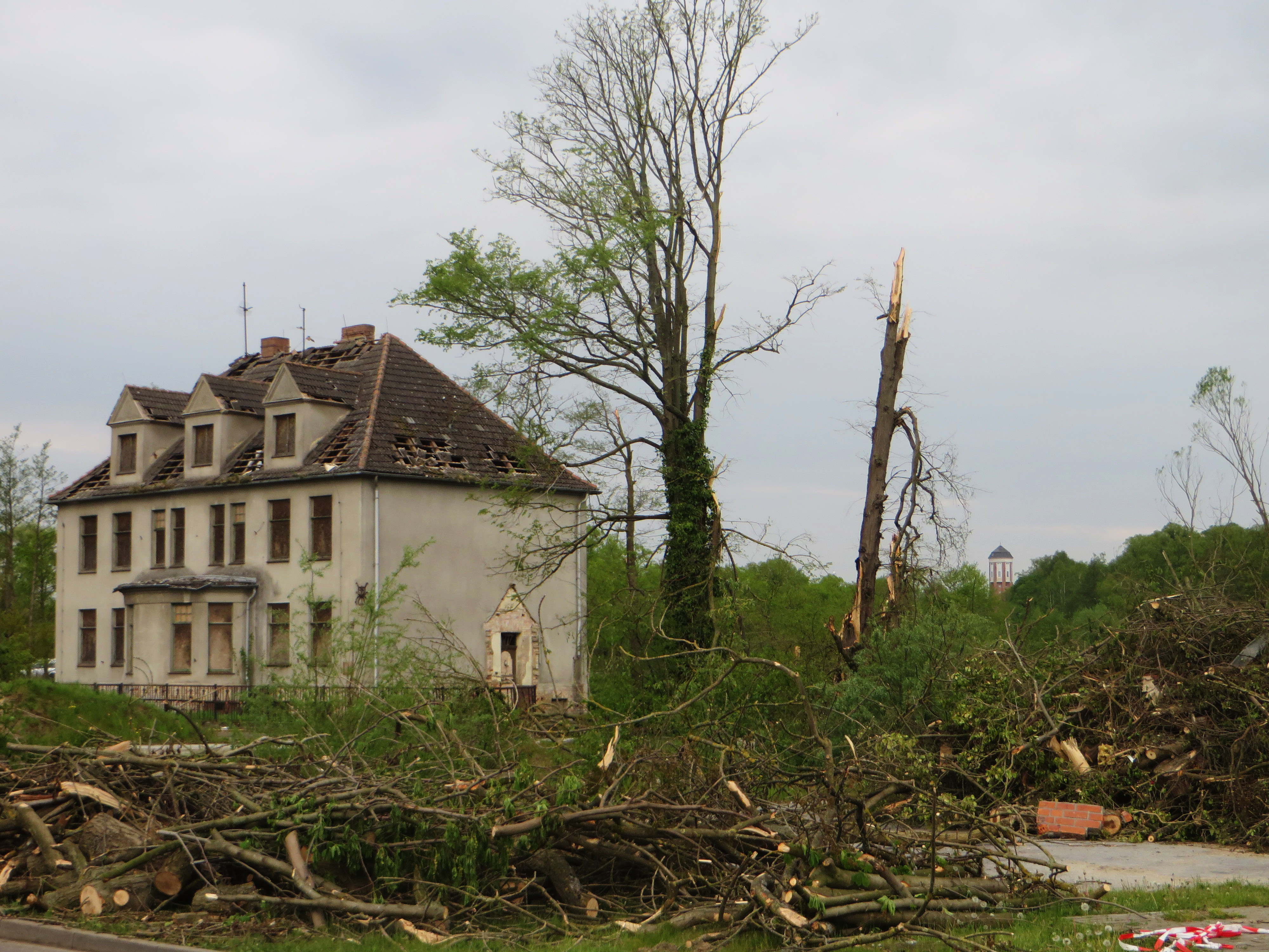 Gebäude in der Wismarschen Straße in Bützow vier Tage nach dem Tornado.